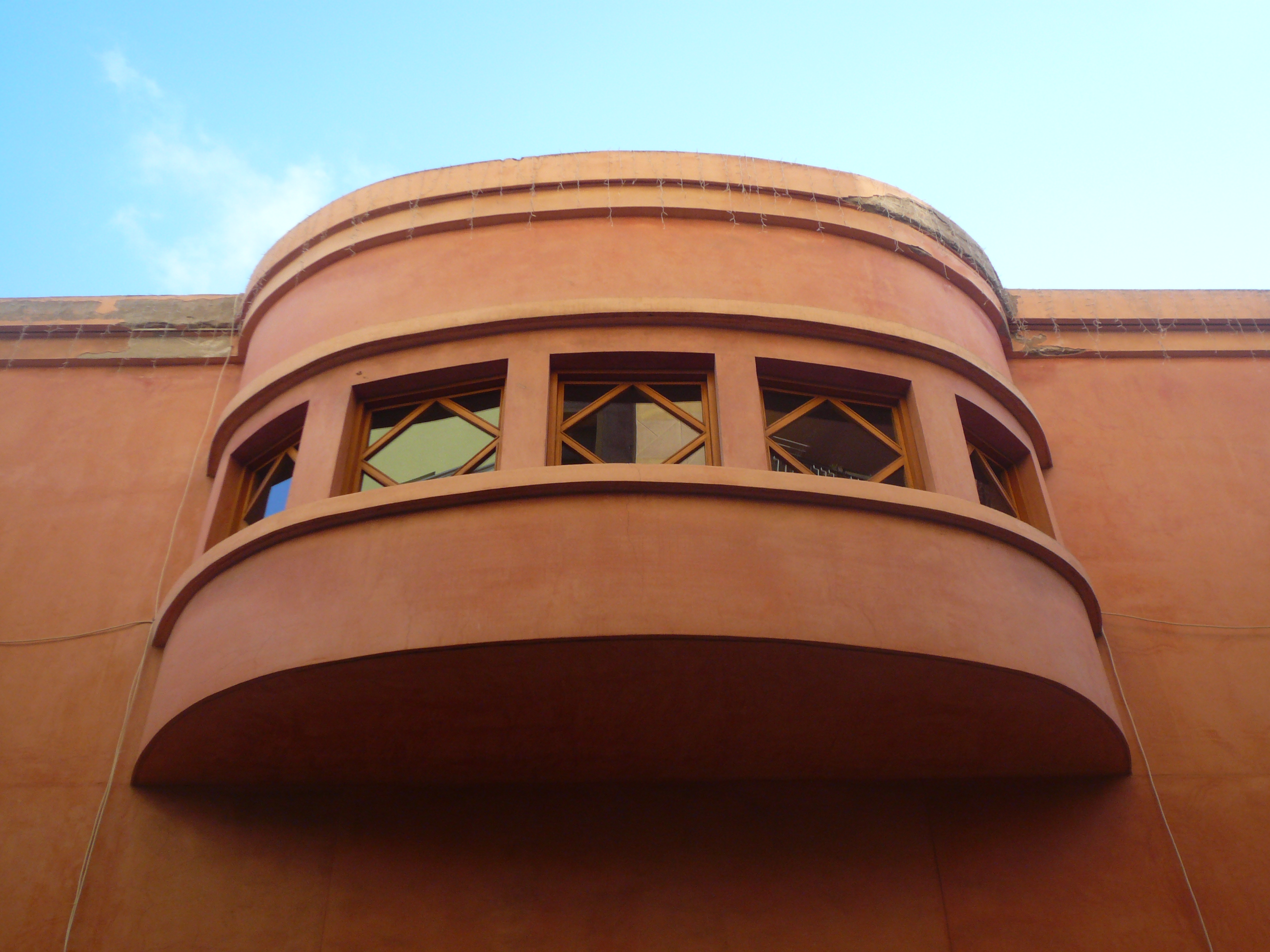 Teatre Joventut (l'Hospitalet de Llobregat) Object location41° 22′ 21″ N, 2° 07′ 04.3″ E